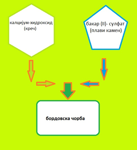 Справљање бордовске чорбе